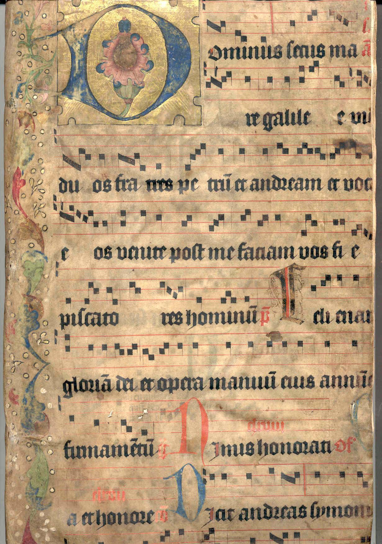 Pergamentmakulatur: Gradualseite als Bucheinband (Vorderdeckel, Ausschnitt), Pergament. Es handelt sich um das Propium der Vigilmesse am Vorabend des Festes des Apostels Andreas (29. November) und damit um die erste Seite des Propium de Sanctis. Zu erkenenn ist: der Introitus Dominus secus ma/re galilee vi[dit] / duos fratres petru[m] et andream et voc[avit] / eos venite post me faciam vos fie[ri] / piscatores hominu[m]. P (=Rubrik: Psalmvers/Versus zum Introitus) Celi enar[rant] / gloria[m] dei et opera manuu[m] eius annu{ntiat] / firmame]n]tu[m]. G (Rubrik: Graduale): Nimis honorati; of (Rubrik, Offertorium) G[lori]/a et honore; C (Rubrik: Communio): Dicit andreas symoni [fratri suo invenimus messiam qui dicitur christus et adduxit eum ad ihesum]. (Eingebunden: Friederich Martens: Hispanische Reise Beschreibung De Anno 1671. Handschrift, 17. Jahrhundert)